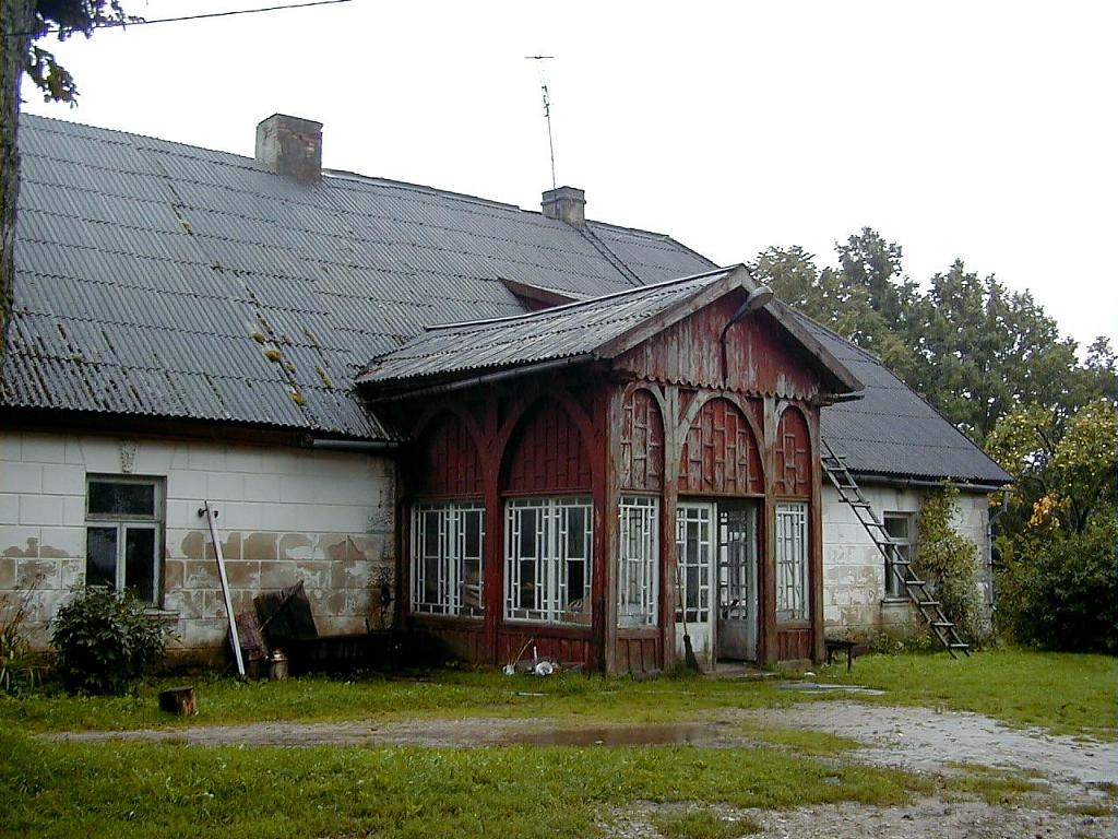 Mātru muižas pils 2003-08-30